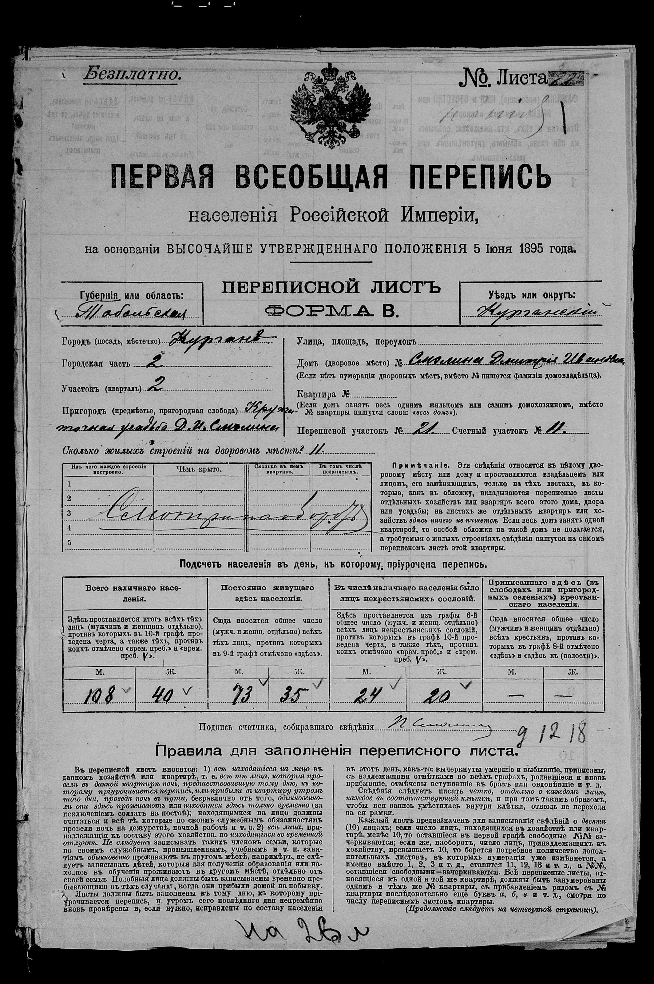 Перепись 1897, Тобольская губерния, г. Курган, усадьба Д.И. Смолина